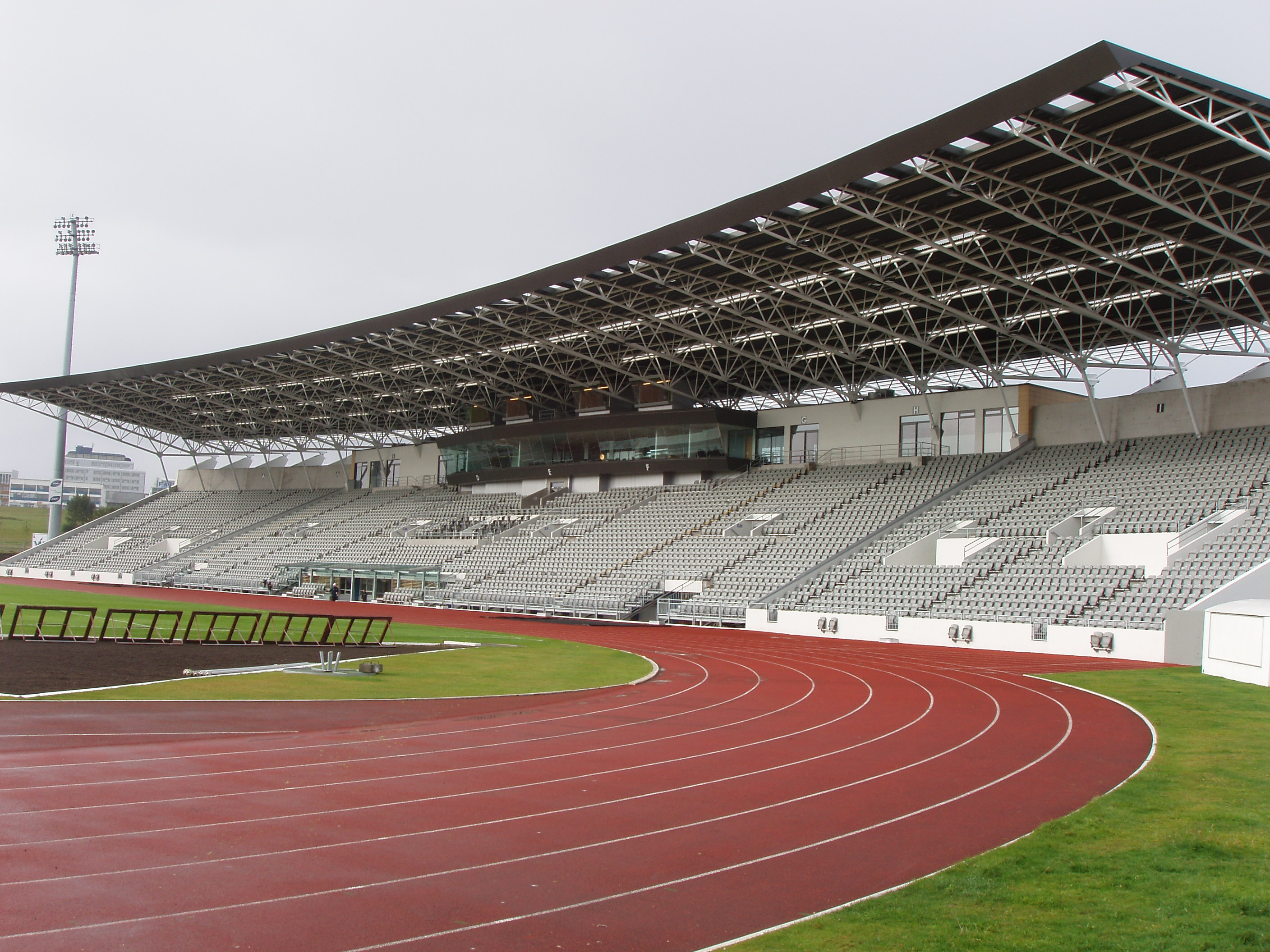 Laugardalsvolllur (main stand)